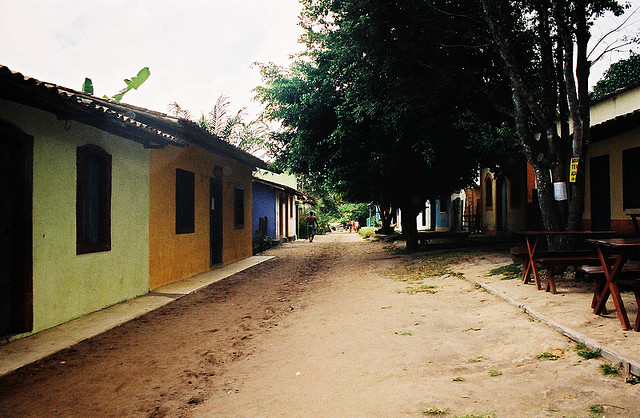 caraíva